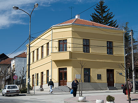 Зграда у којој се налазила Дечја редакција Дечјих новина из Горњег Милановца.